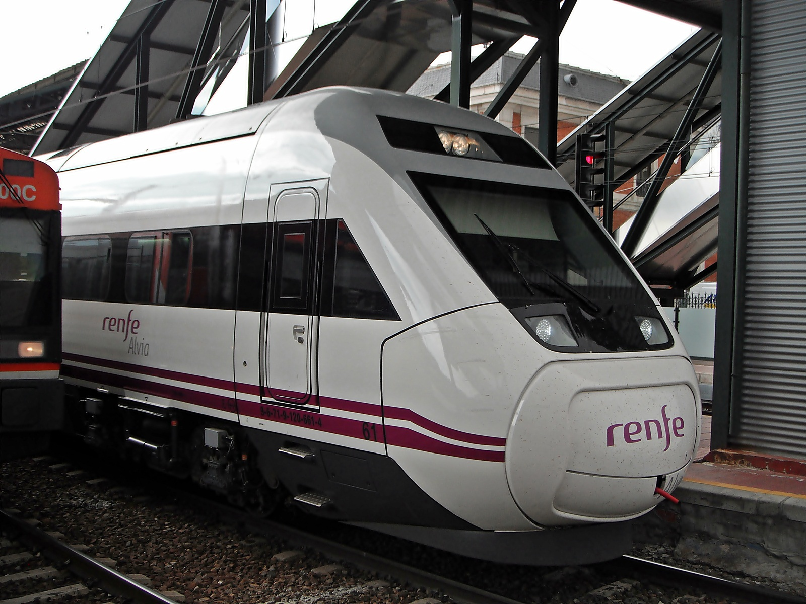 Tren Alvia Madrid-Hendaya estacionado en la estación de Valladolid-Campo Grande.